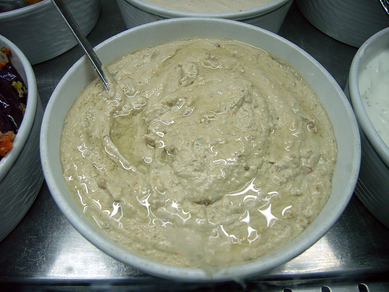 Baba Ghanug